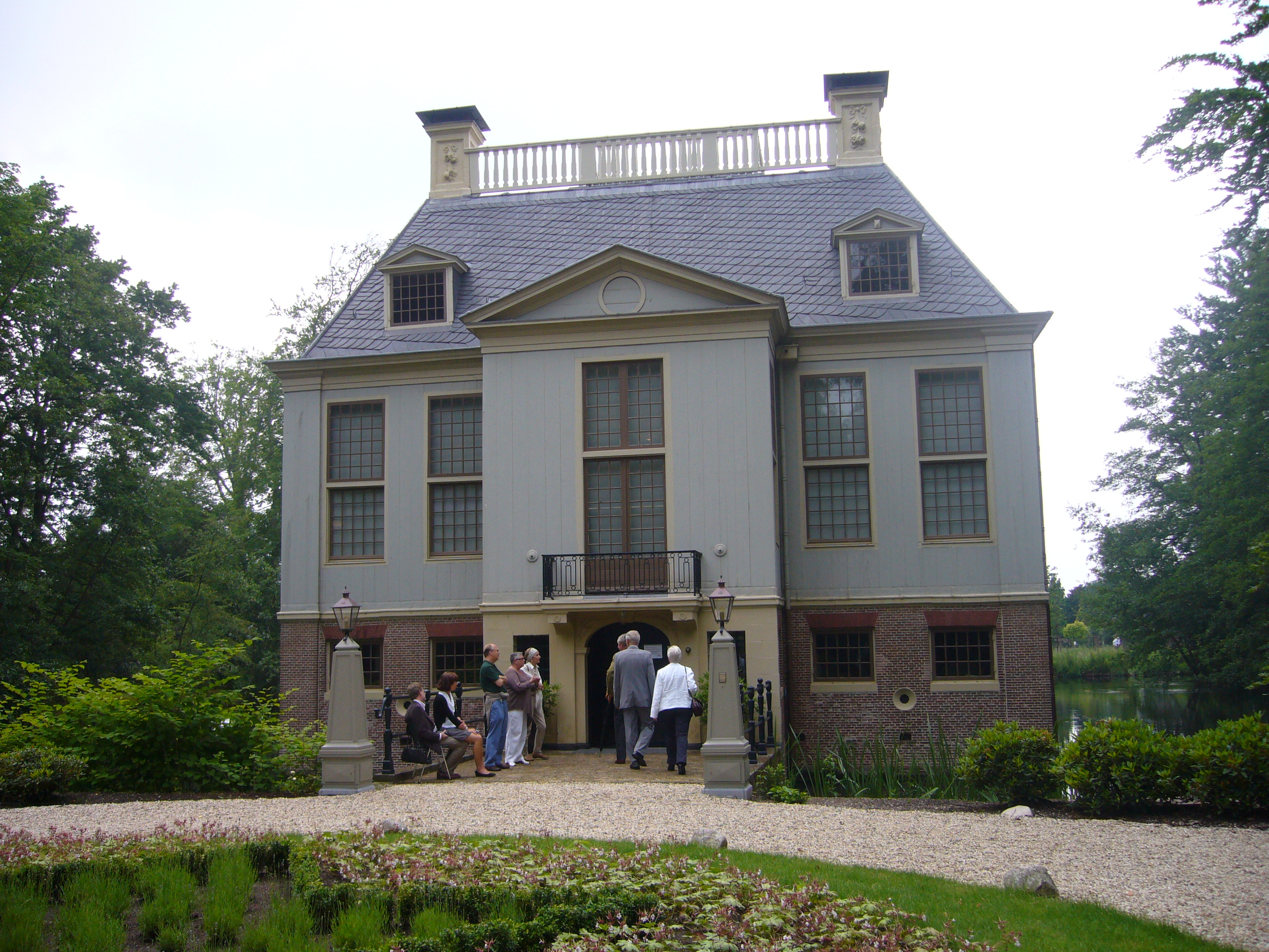 Trompenburgh in 's-Graveland, voorkant